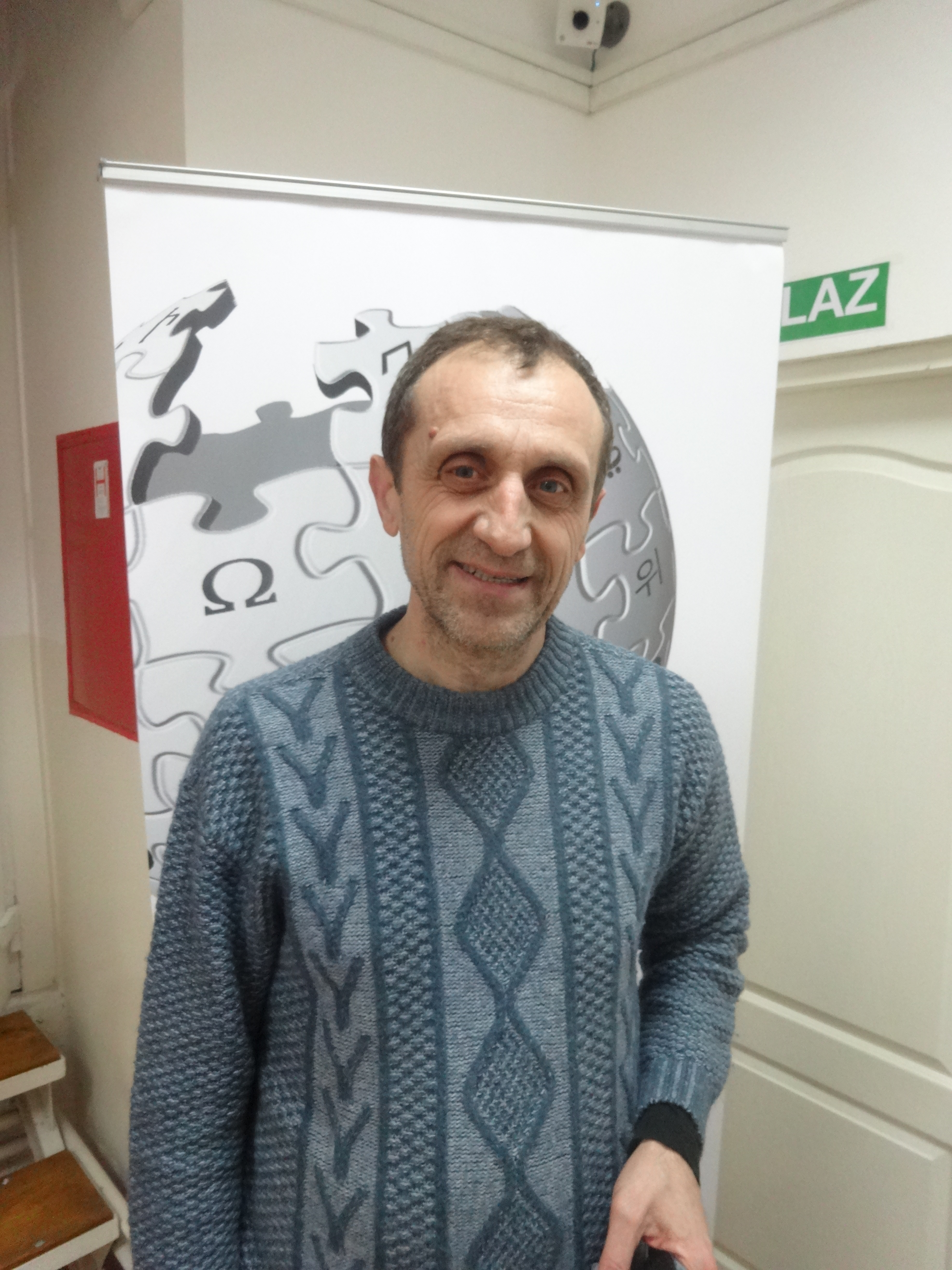 Srpski (latinica): Vladimir Cvejić, pantomimičar